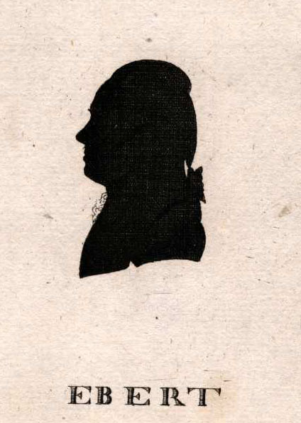 Scherenschnitt - Johann Jacob Ebert (1737-1805), deutscher Mathematiker, Dichter, Astronom, Journalist und Autor